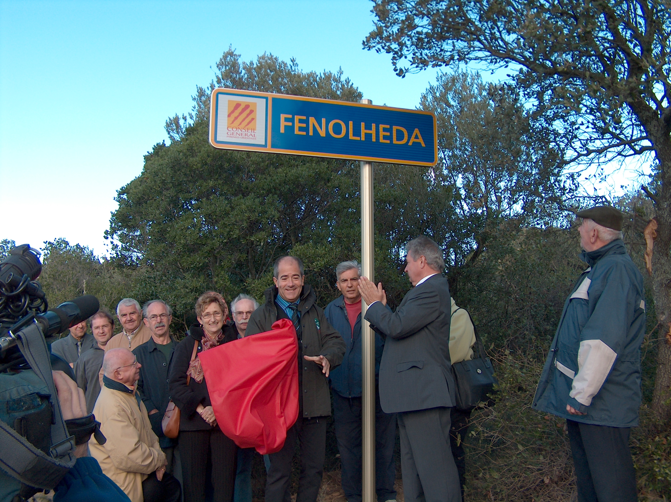 Christian Bourquin, lors de l'inauguration d'un panneau de signalisation en occitan, dans le Fenouillèdes.